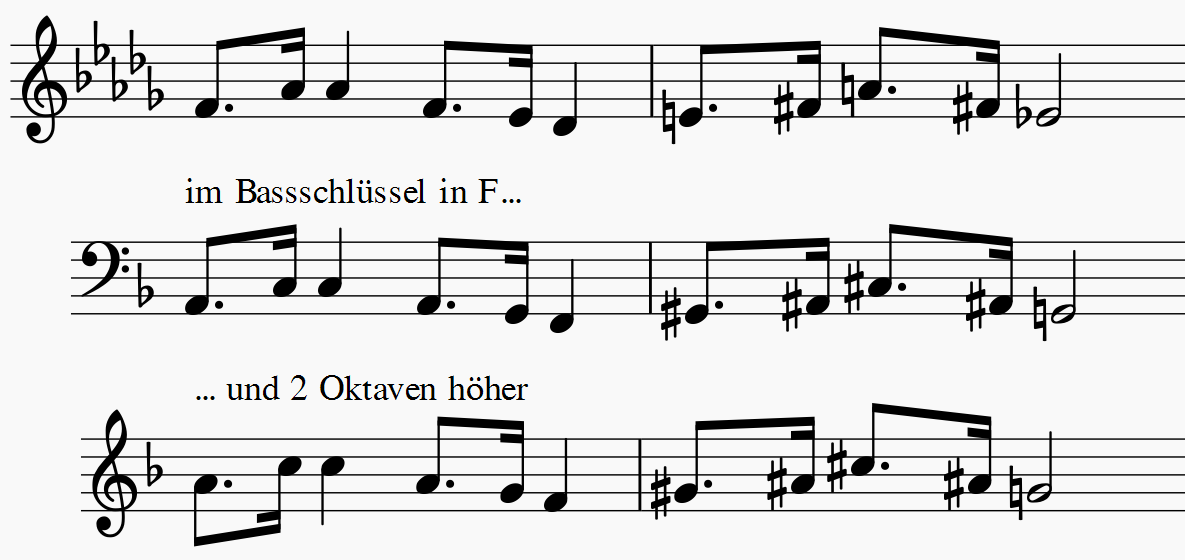 Transposition über den Bassschlüssel